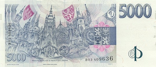 5000 CZK reverse